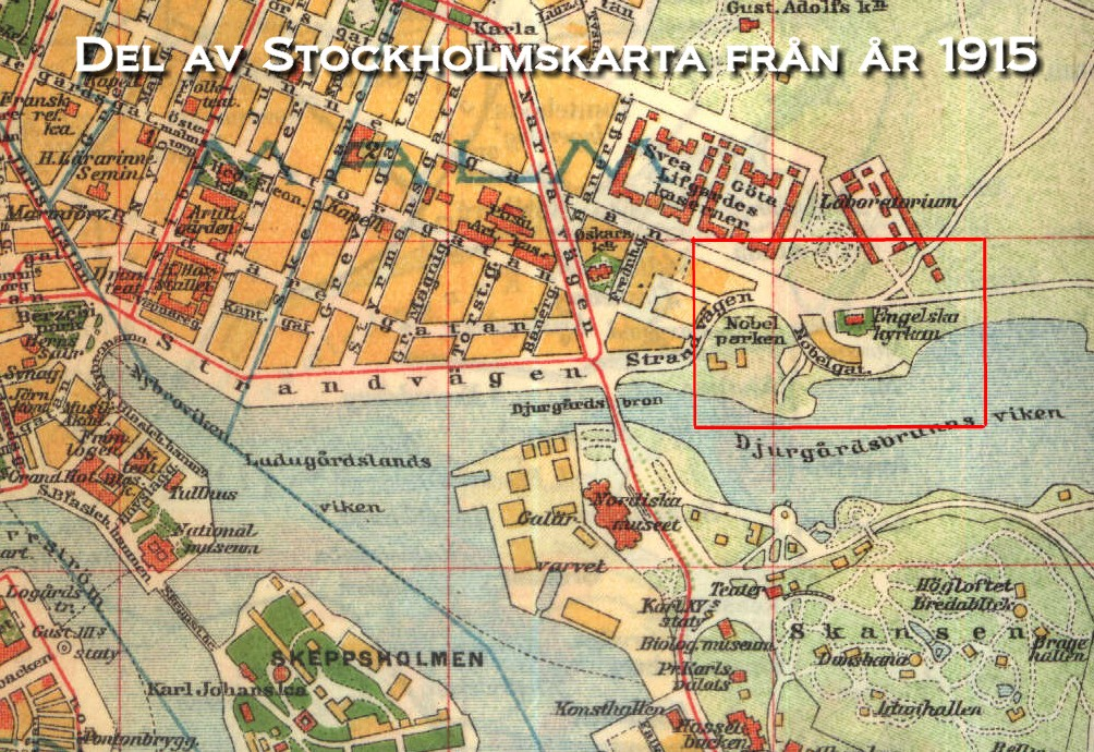 Del av Stockholmskarta från 1915